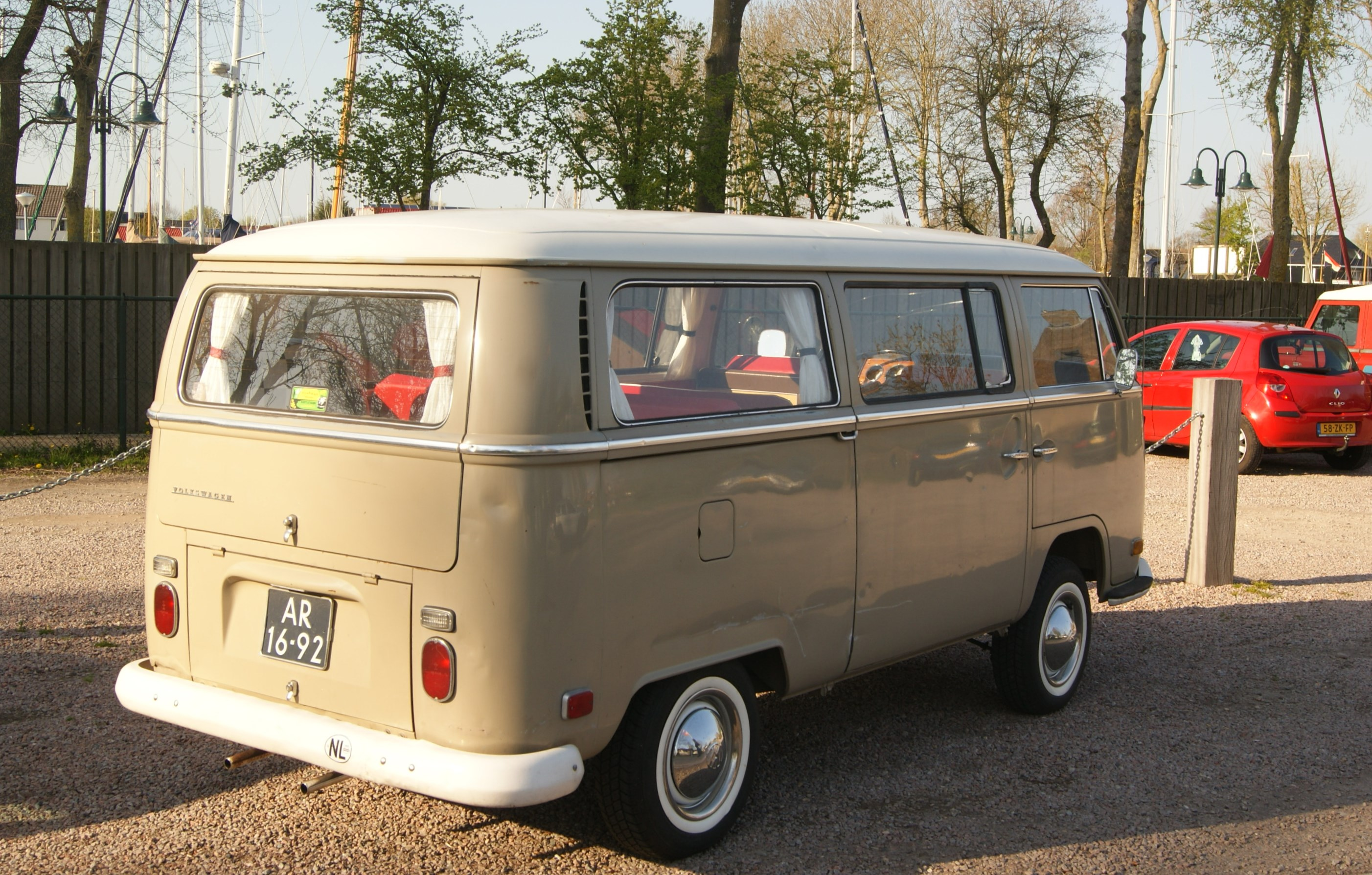 AR-16-92